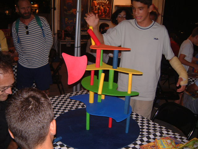 Phoito libre de droits donnée par l'association Destination jeux